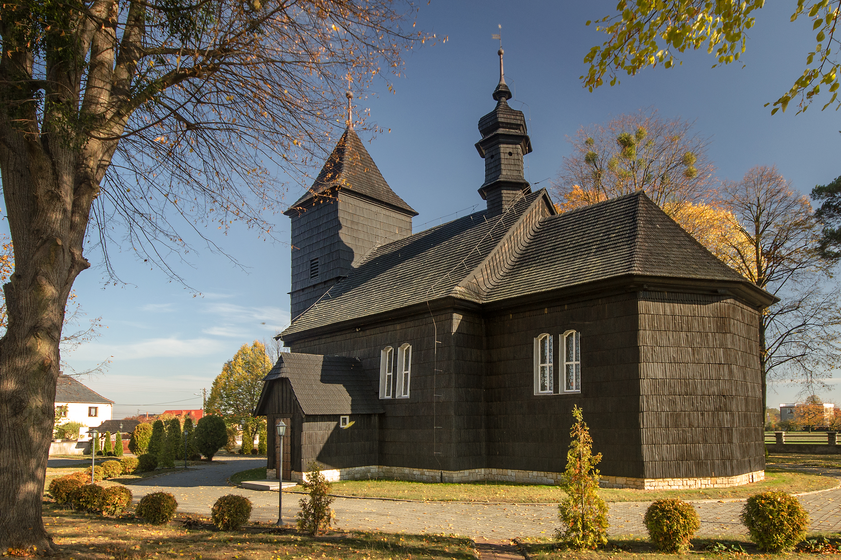 Ochodze, kościół par. p.w. św. Marcina, 1702, 1940